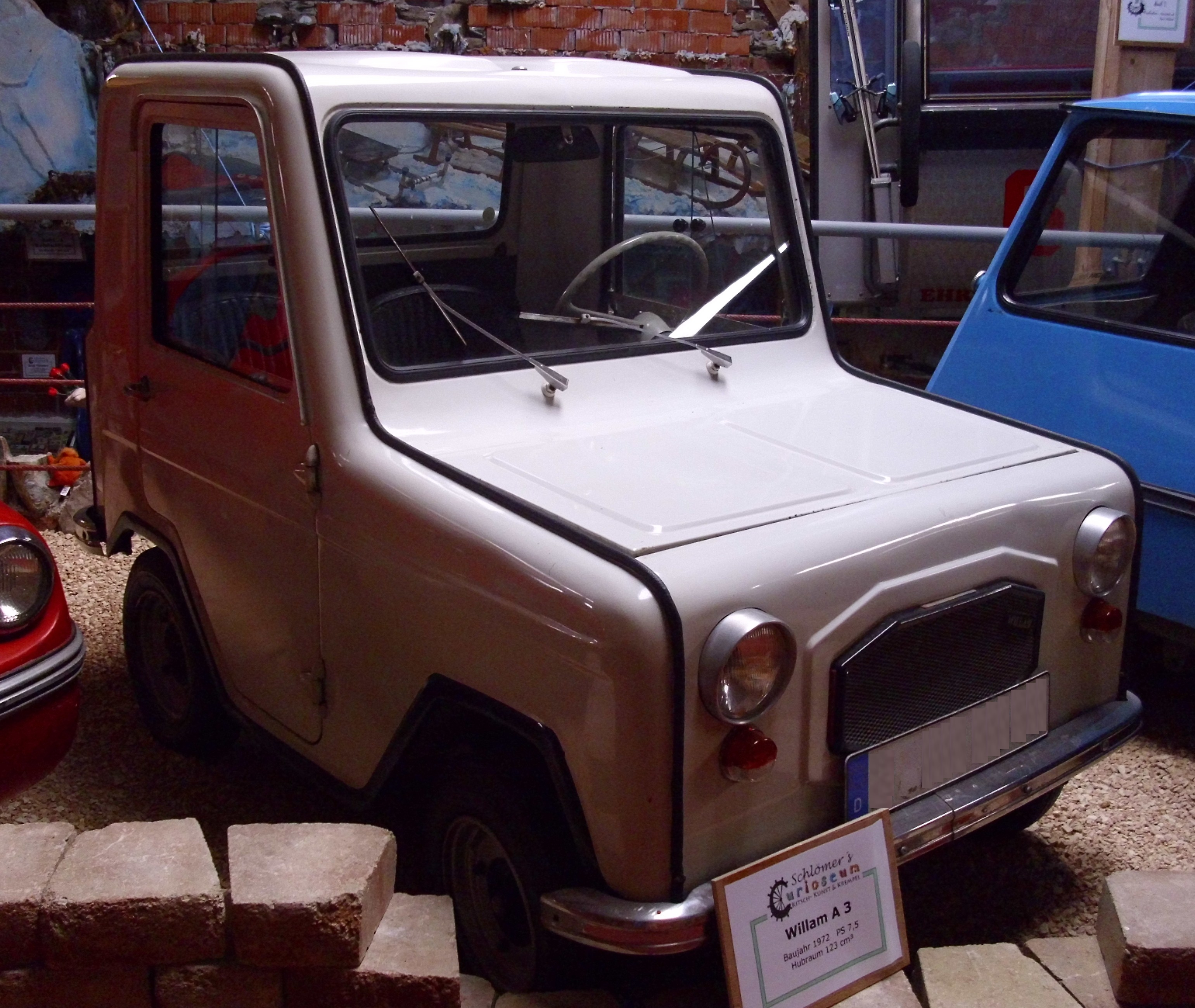 Willam A 3 1972 im Curioseum in Willingen-Usseln